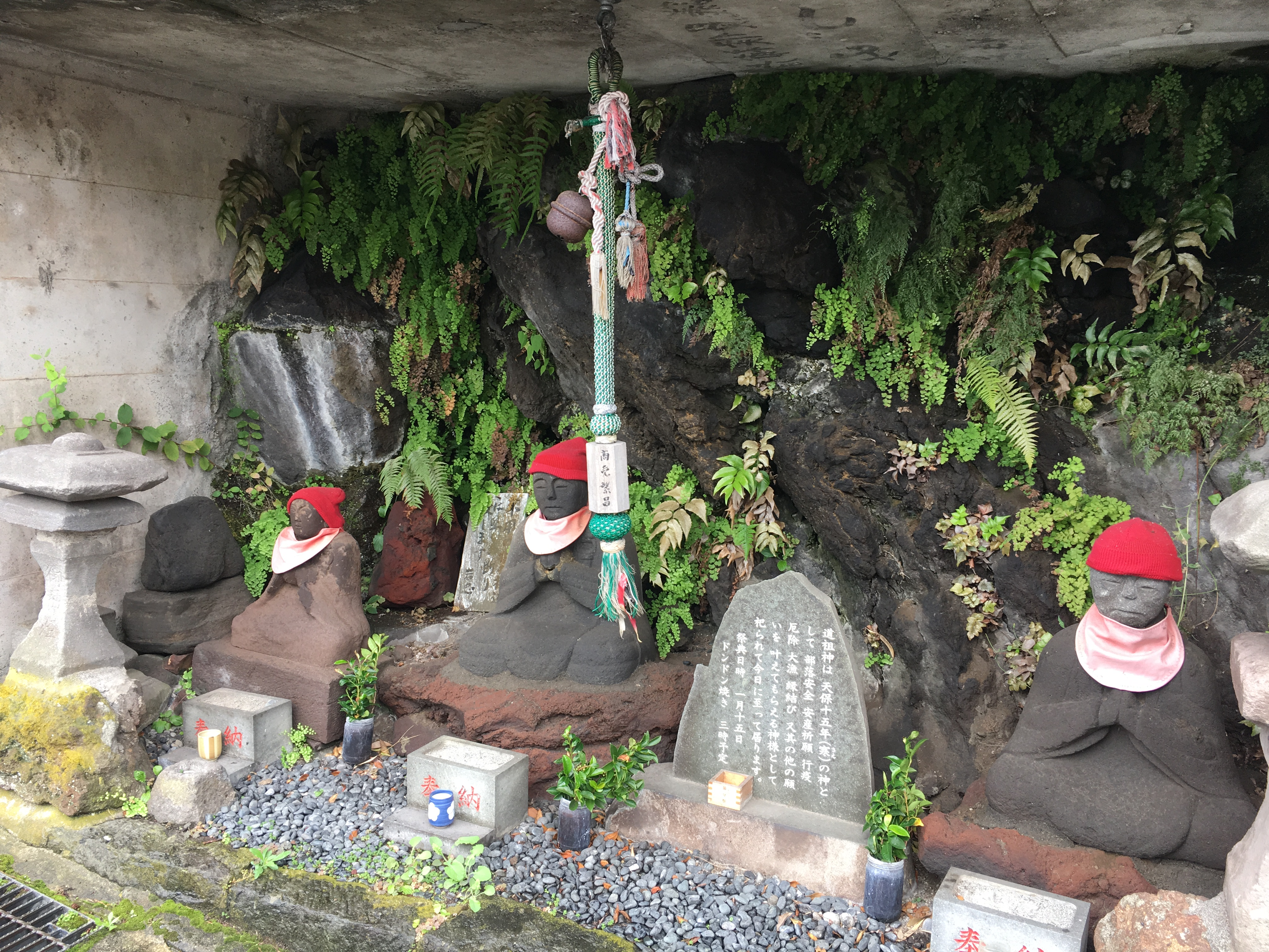 下の道祖神